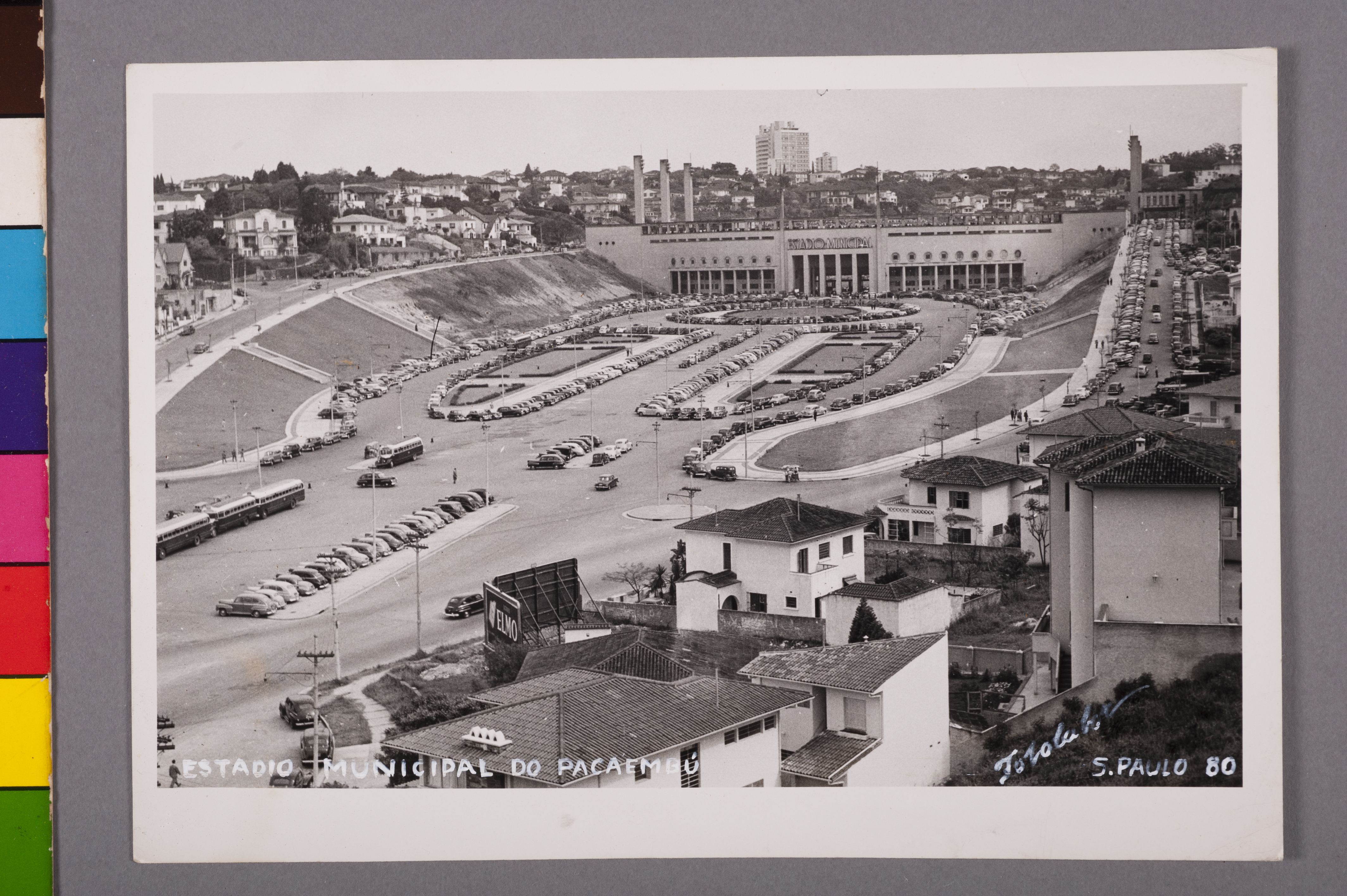 Obra que integra o acervo do Museu Paulista da USP. Coleção Werner Haberkorn - CHW